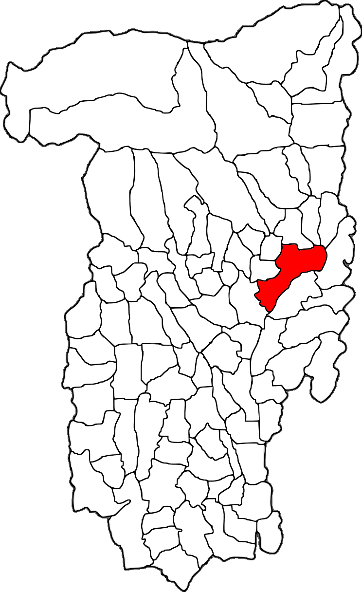 Lage der Stadt Râmnicu Vâlcea im Kreis Vâlcea (RO).